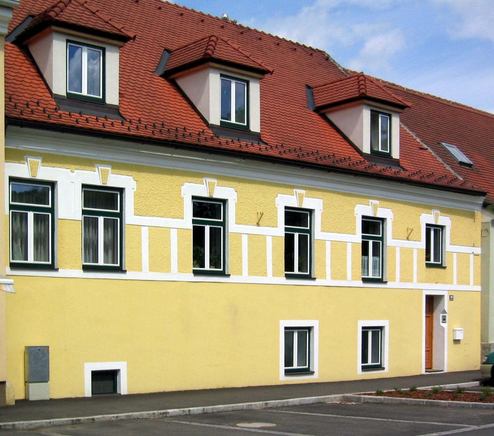 Sitzendorf Hauptplatz 19